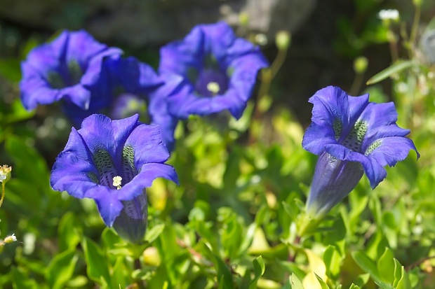 Gentiana acaulis, Gentiane de koch, Jardin alpin, Jardin des Plantes de Paris